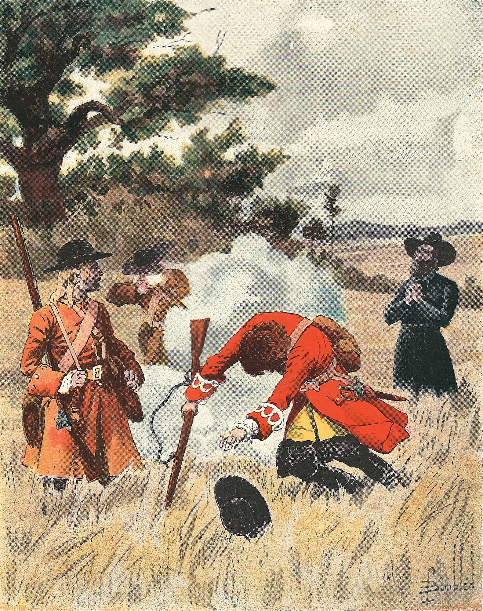 Assassinat de Cavelier de La Salle Illustration tirée de l'Histoire de la Nouvelle France d'Eugène Guénin